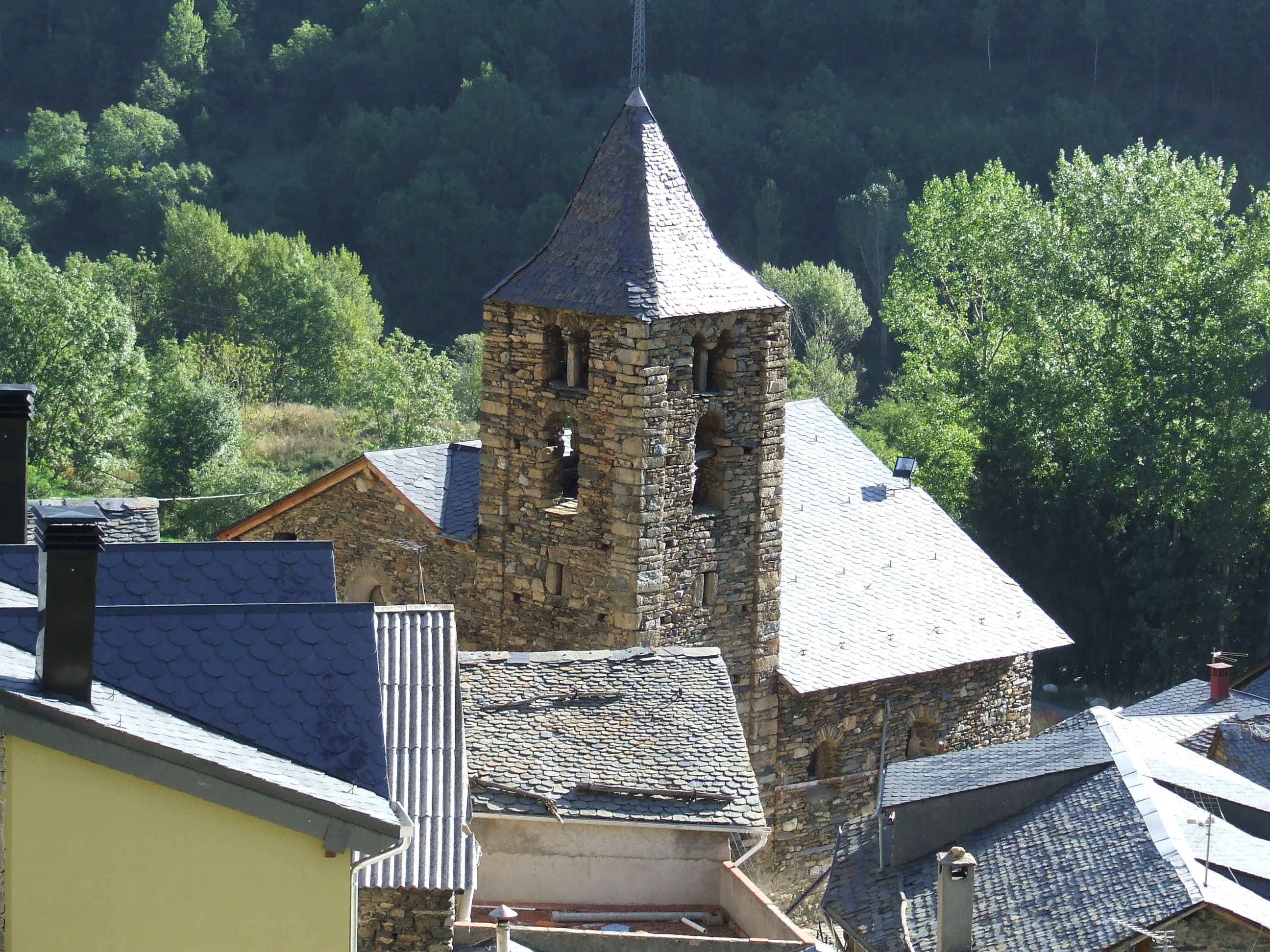 El campanar de Sant Julià d'Espui (la Torre de Cabdella, Pallars Jussà)